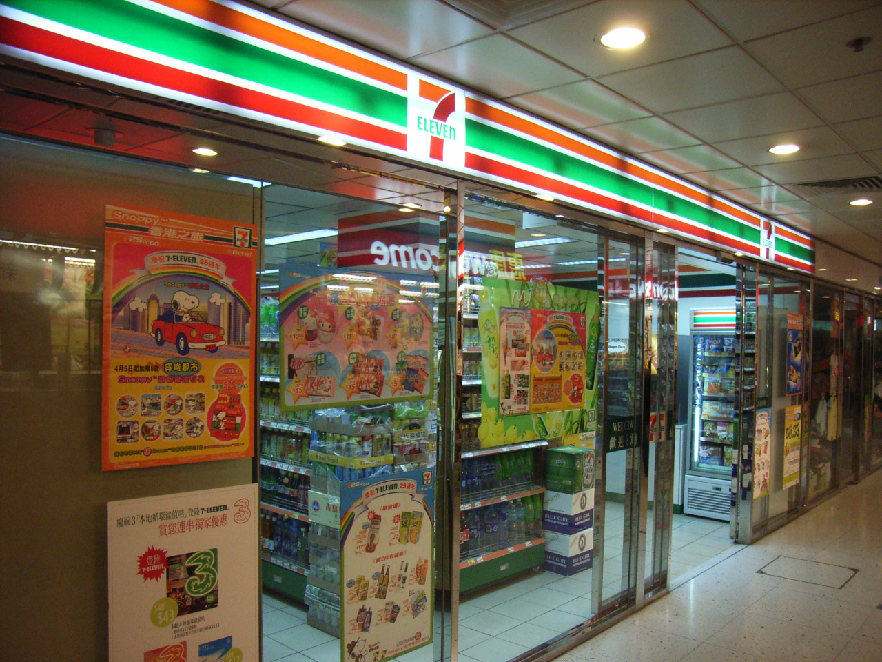 創業商場 (Chong Yip Shopping Centre) 又名 創業中心。 它在香港島石塘咀德輔道西與屈地街交界。